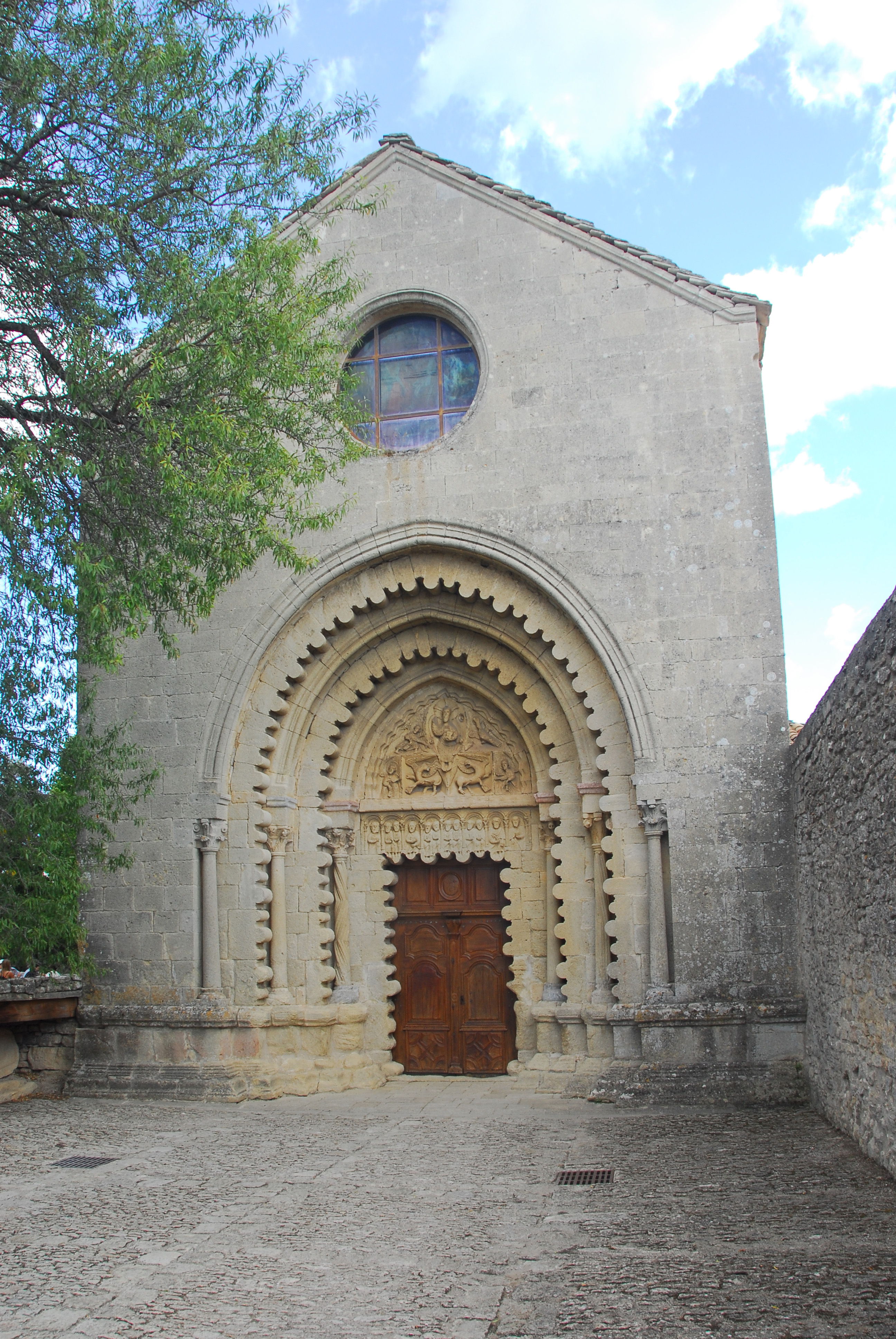 Prieuté de Ganagobie